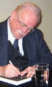 Fritz Rau bei einer Lesung seiner Biographie im Karlsruher Tollhaus im Februar 2006